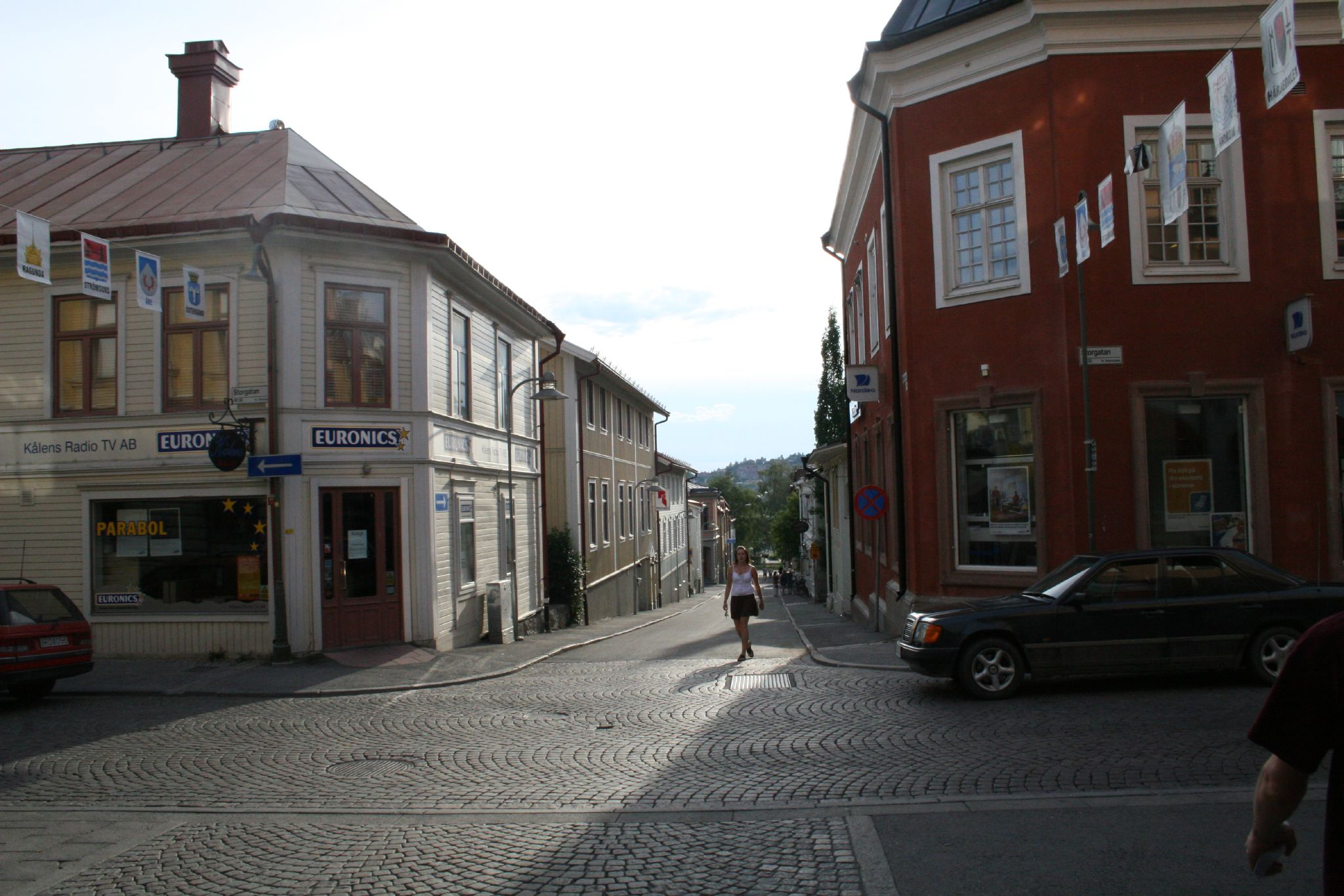 Storgatan, Östersund, Sweden.